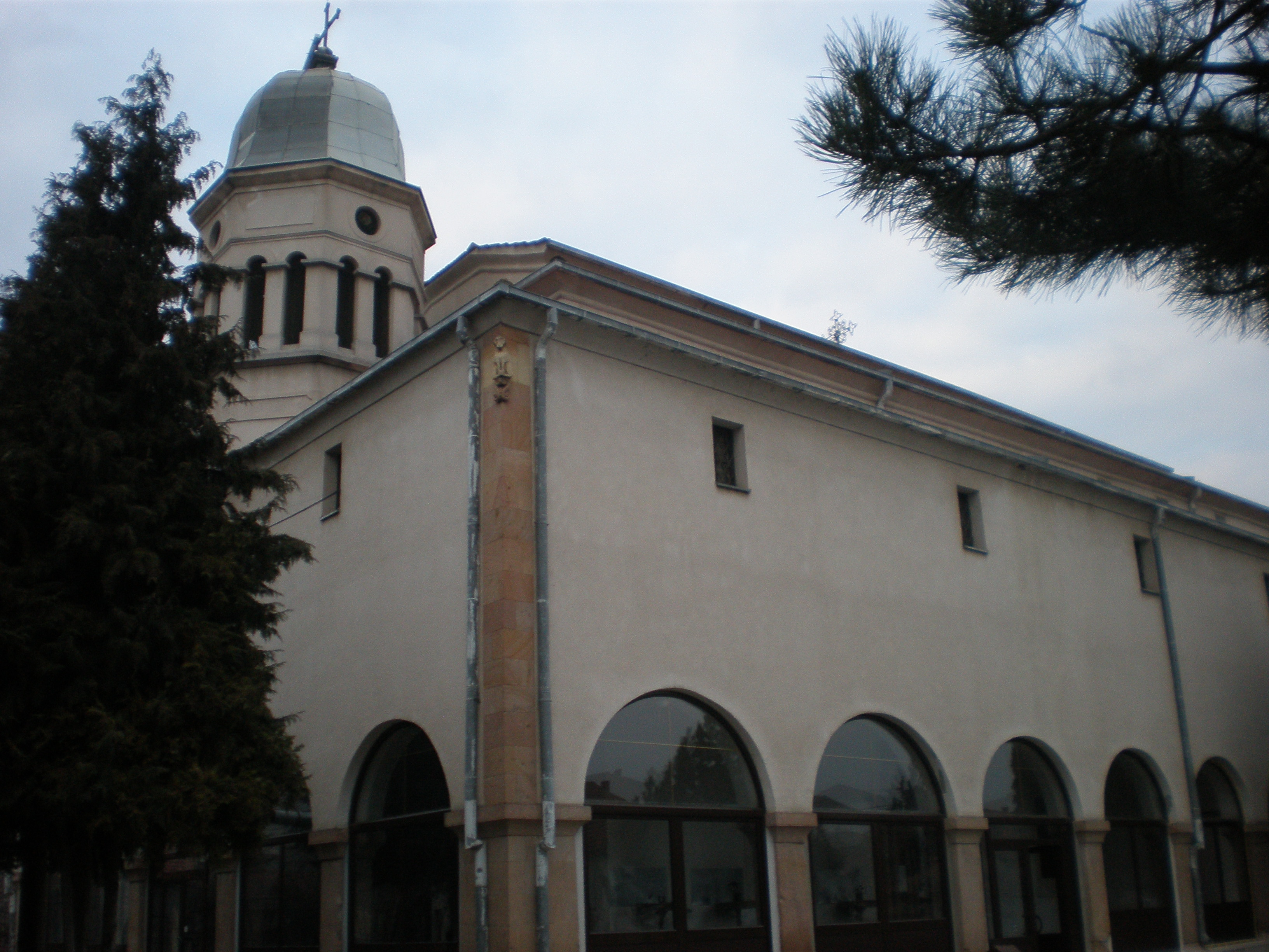 Камбанаријата на црквата Свети Никола во Куманово